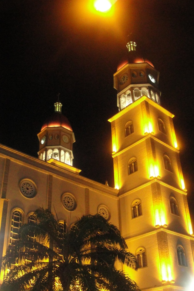 Maturin, Monagas Vzla